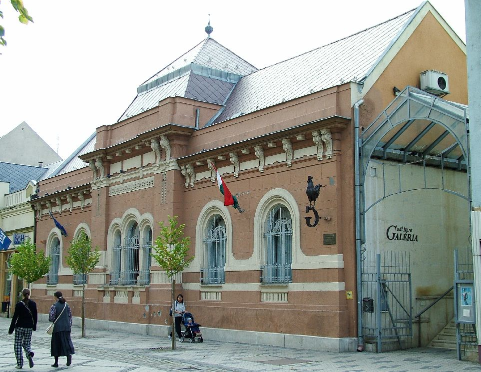 Gaál Imre Galéria in Pesterzsébet, photography by József Riesz